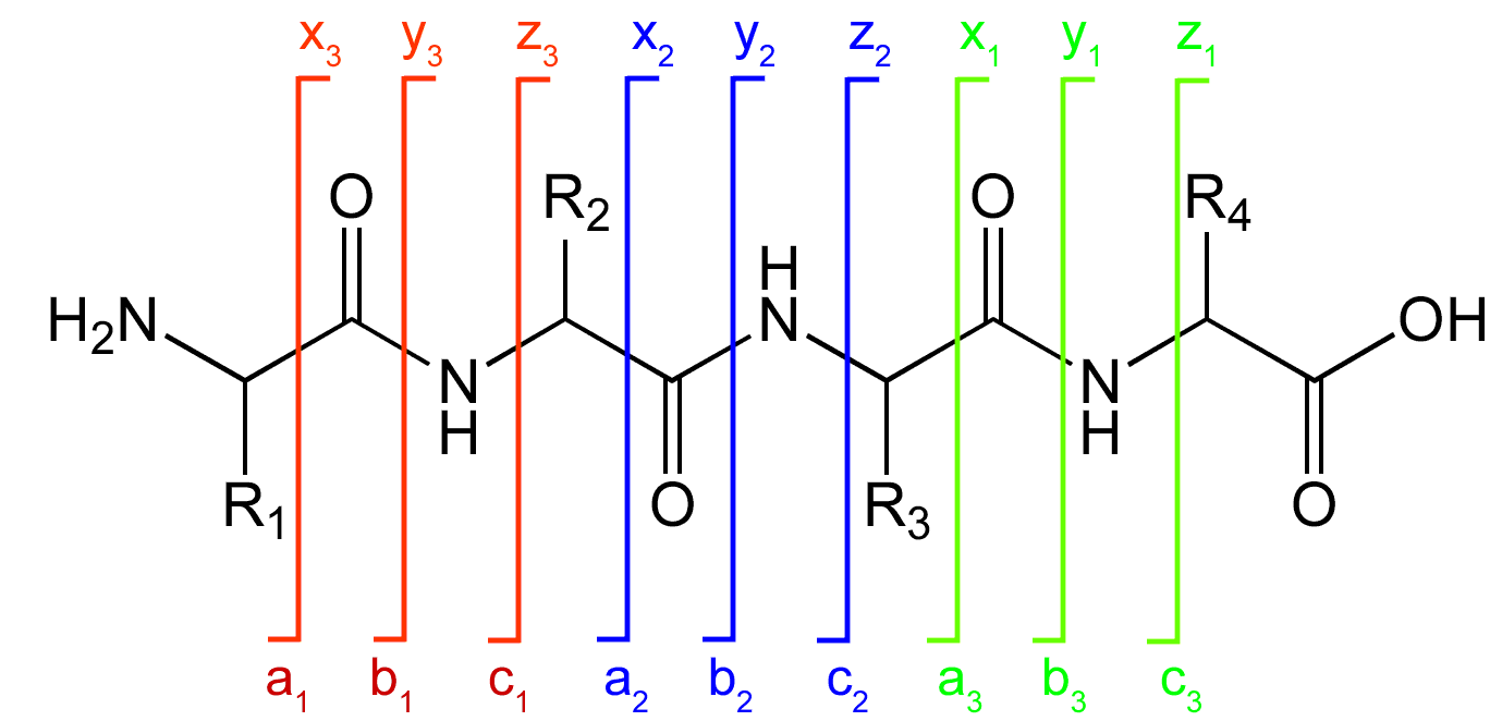 Peptide fragmentation notation